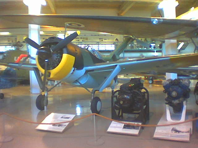 VL Humu kuvattuna Keski-Suomen ilmailumusossa